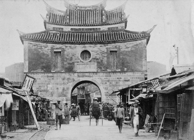 臺北西門，本建築物於1905年拆除。